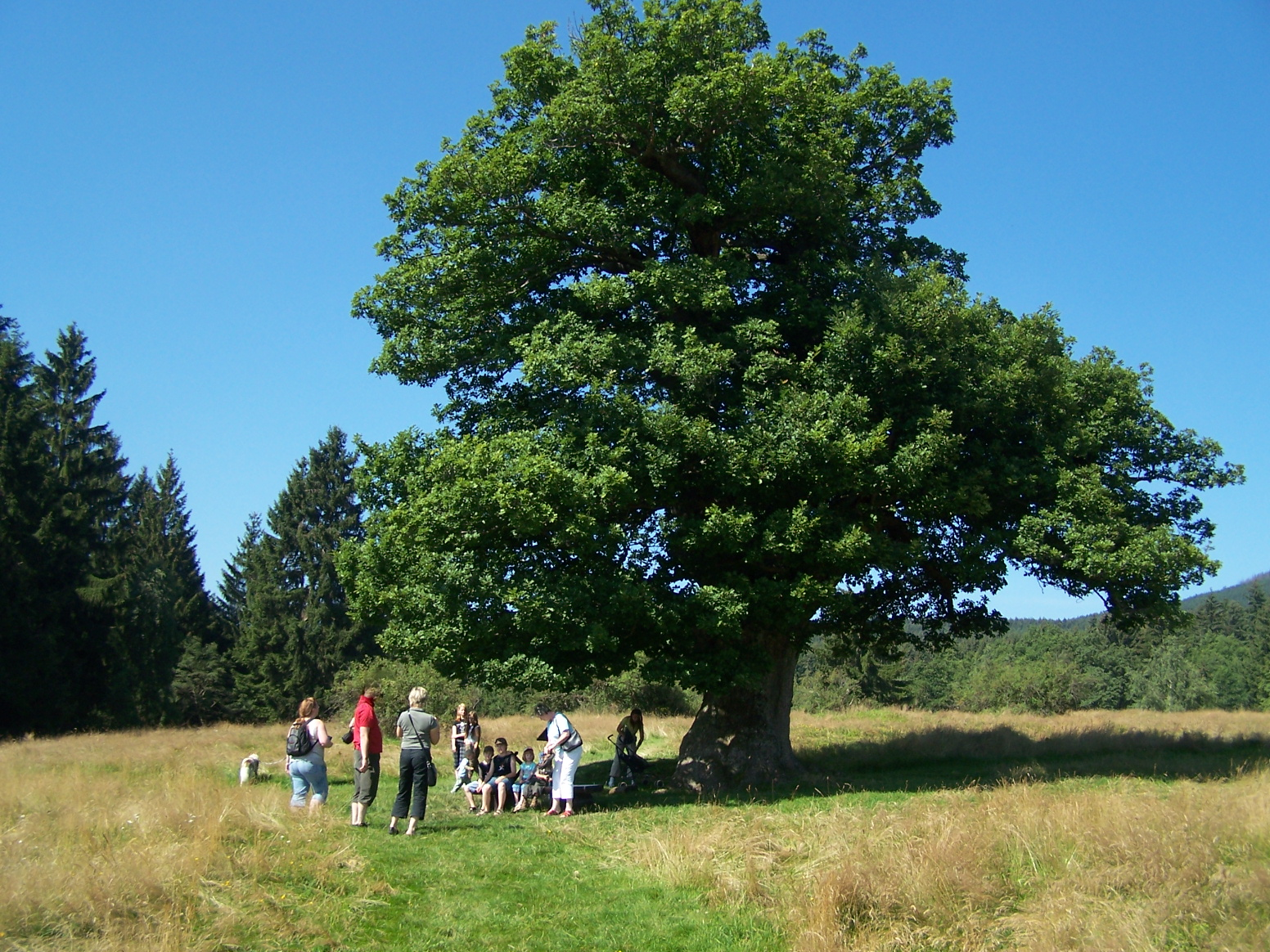 jpg Datei, erstellt mit DMC TZ 61